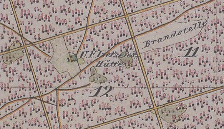 Lietzenhütte, abgegangener Teerofen, später Unterförsterei auf der Gemarkung Döberitz, einem Ortsteil der Stadt Premnitz, Lkr. Havelland, Brandenburg, Urmesstischblatt 3440 Premnitz von 1840